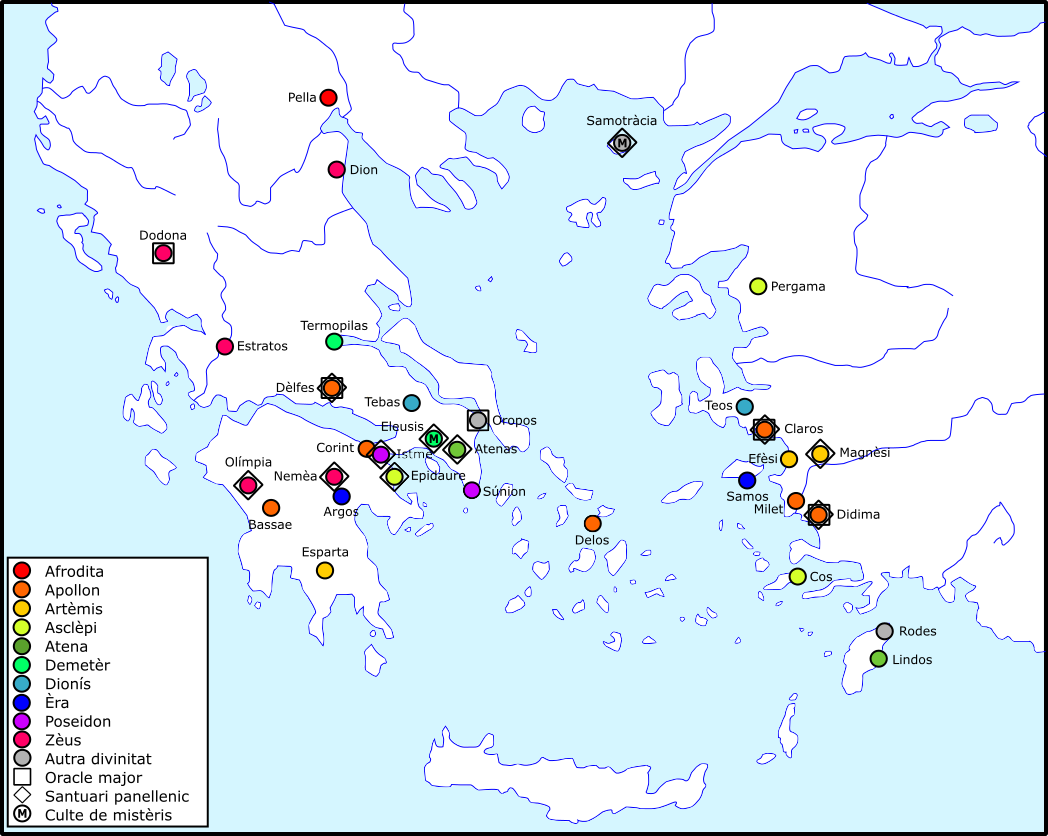 Santuaris principaus de Grècia antica.